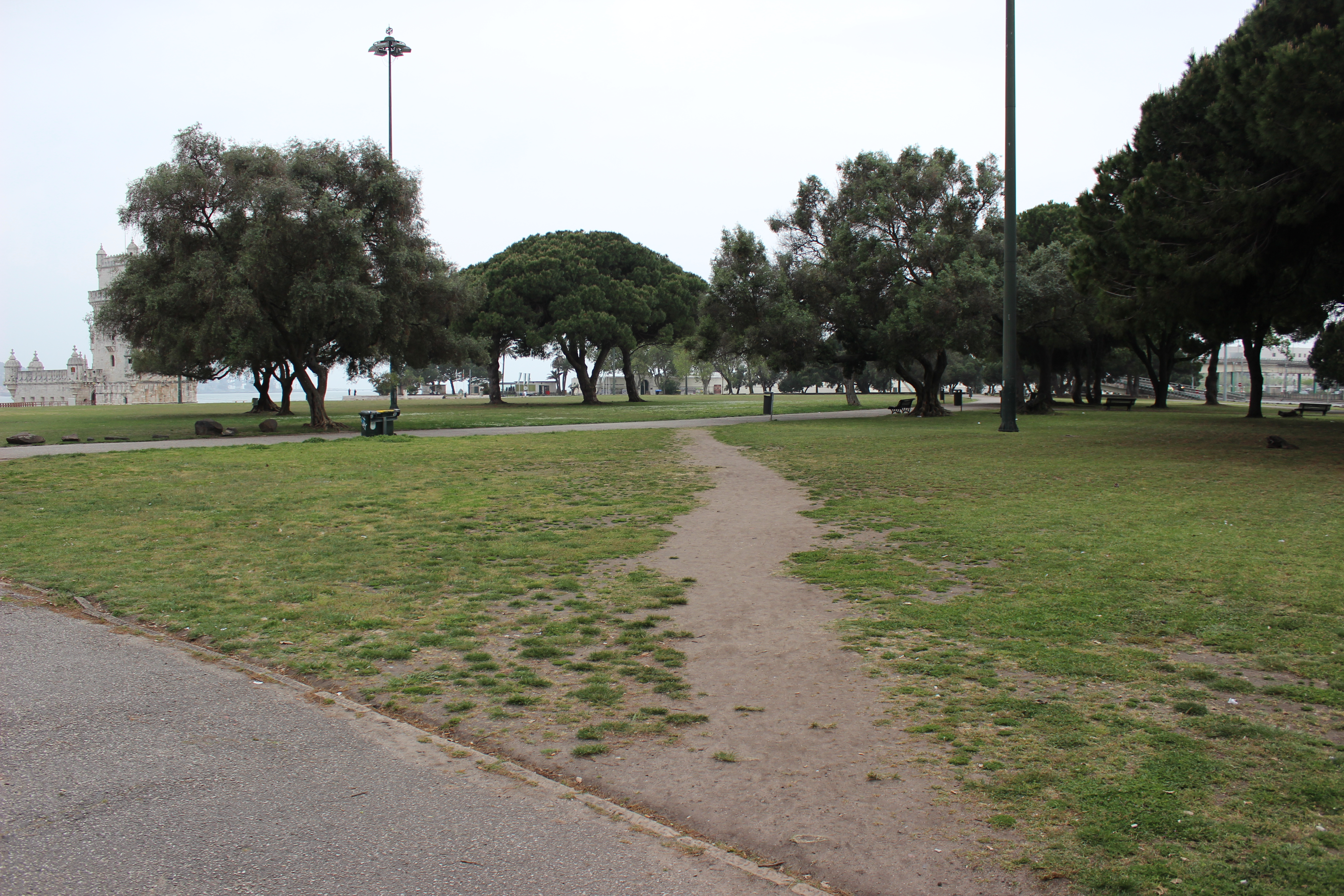 Belem